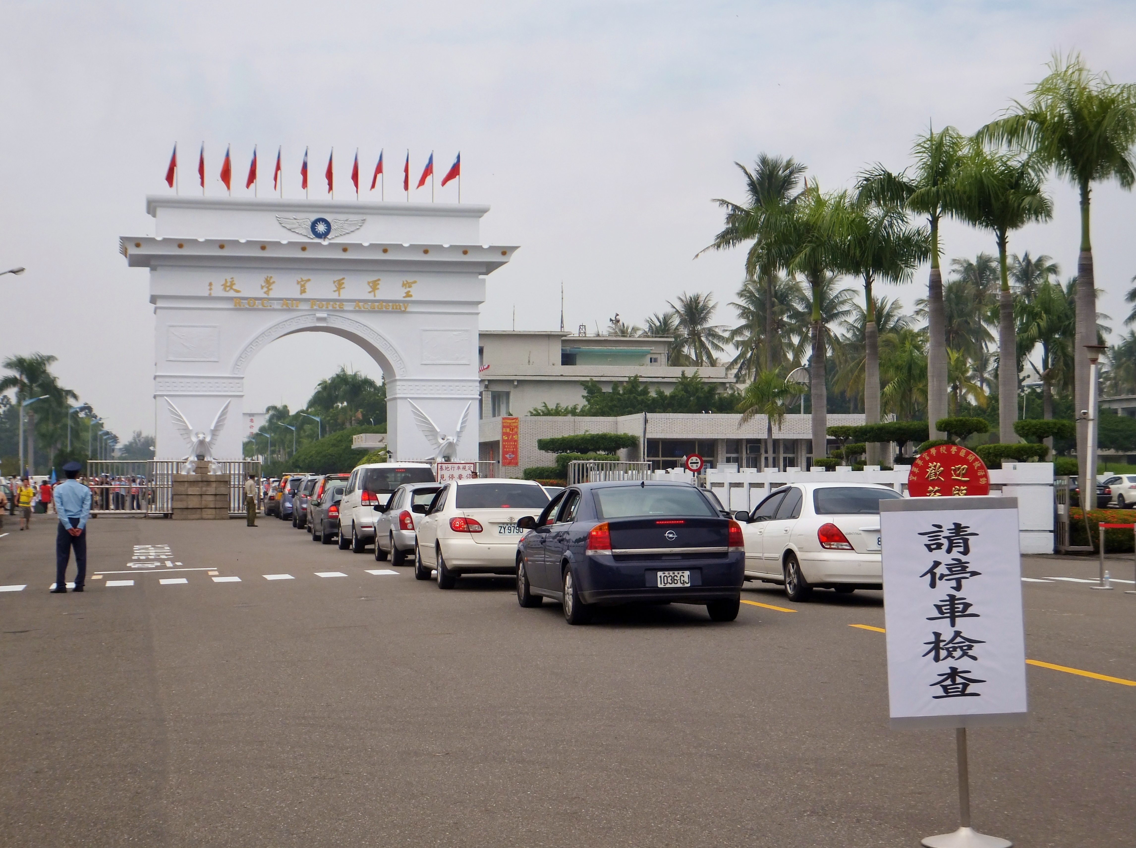 空軍官校正門前，停車等待車檢的遊客車輛。